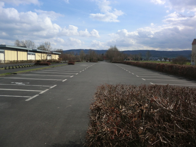 Parkplätze vor dem Freibad Gehlenbeck